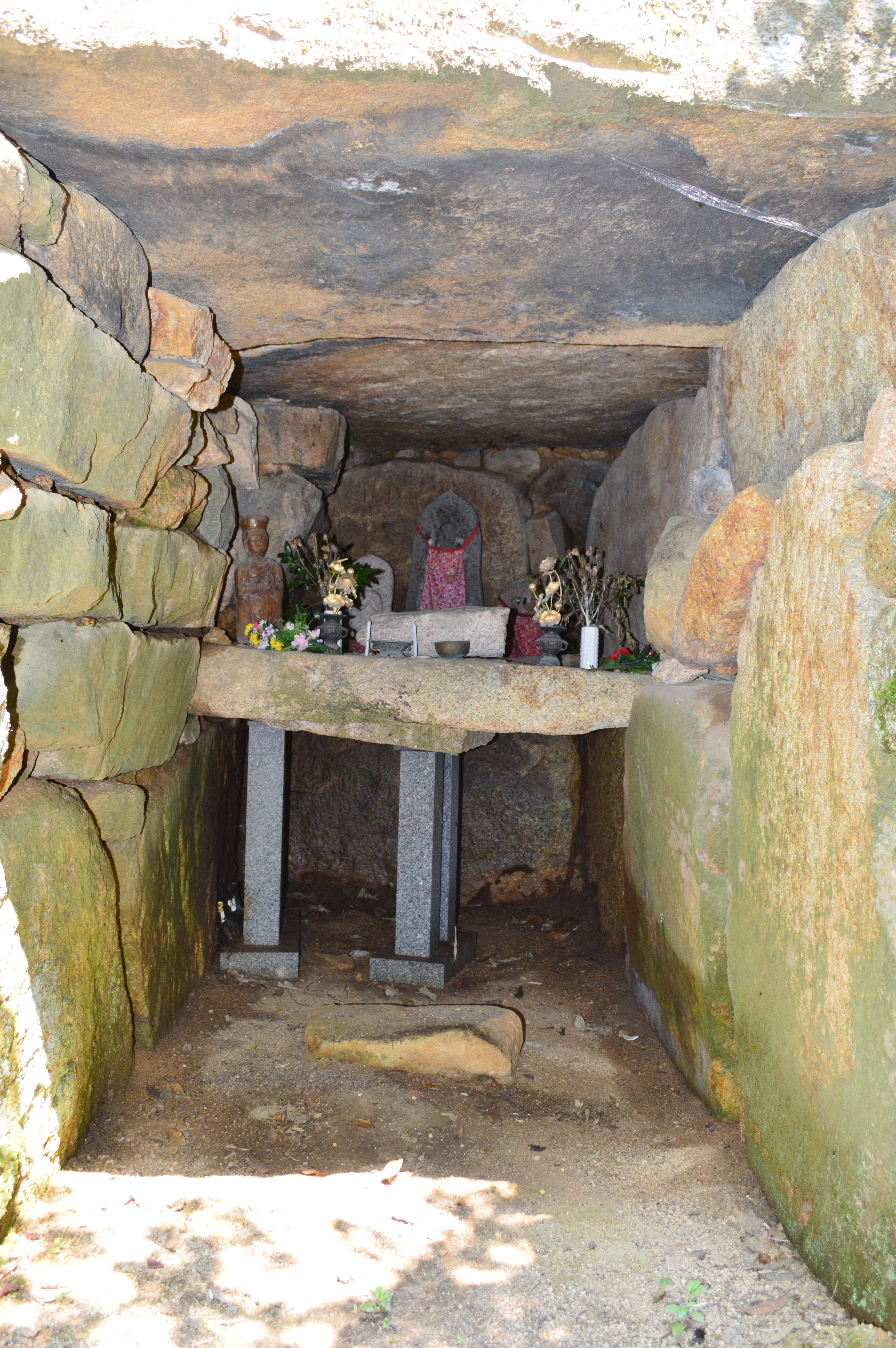 穴地蔵古墳 石室玄室